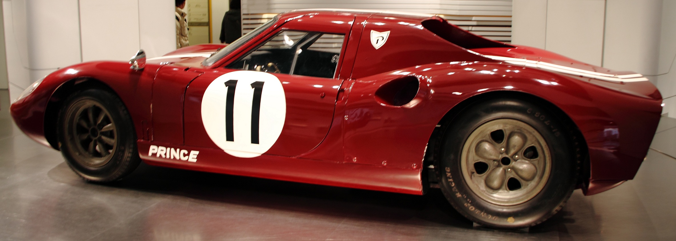 Prince R380 エンジン ：プリンス製GR8 直6 DOHC 2000cc(197PS) 変速機：5速MT 駆動方式：MR 全長 ：3,930mm 全幅 ：1,580mm 全高 ：1,035mm ホイールベース：2,360mm 車両重量 ：660kg